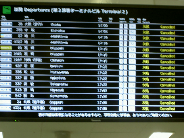 新型コロナウイルスで航空便の運航停止を告げる案内板。